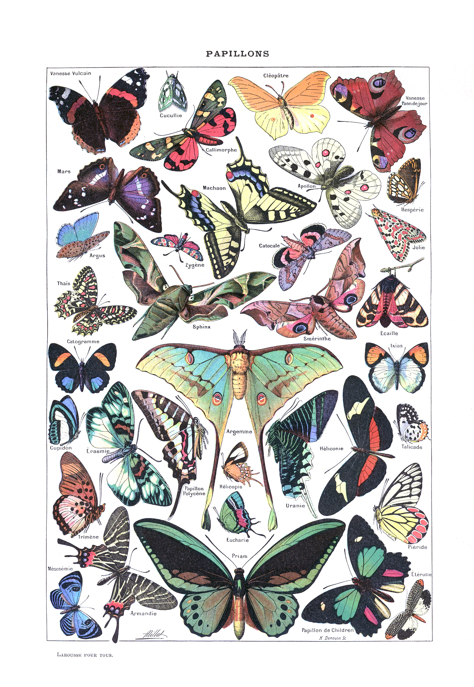 Papillons. Illustré par Adolphe Millot dans Larousse pour tous,[1907-1910]